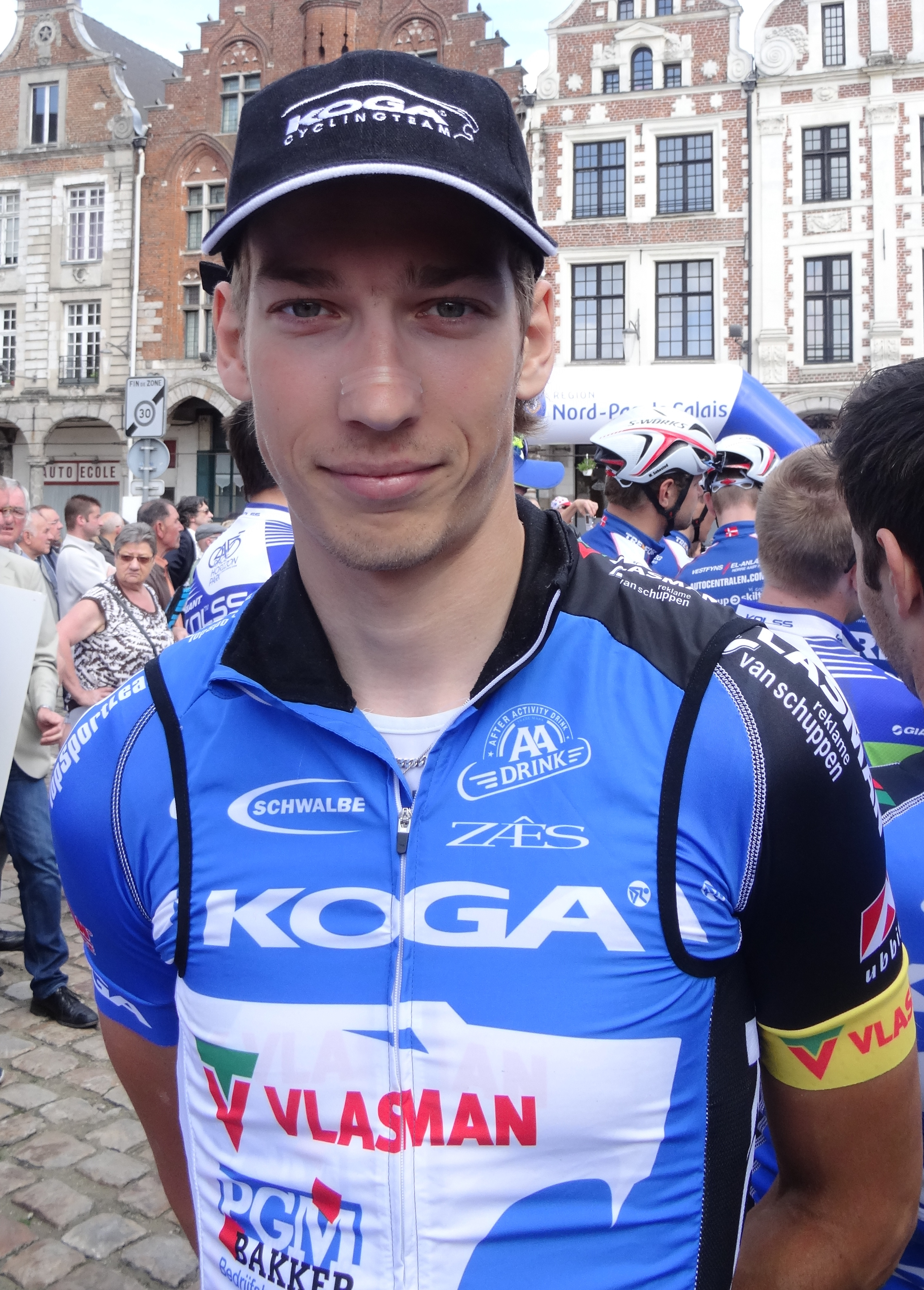 Reportage photographique réalisé le dimanche 25 mai 2014 à l'occasion du départ et de l'arrivée de la troisième étape du Paris-Arras Tour 2014 à Arras, Pas-de-Calais, Nord-Pas-de-Calais, France. Depicted person: Jasper Bovenhuis Depicted team: Koga